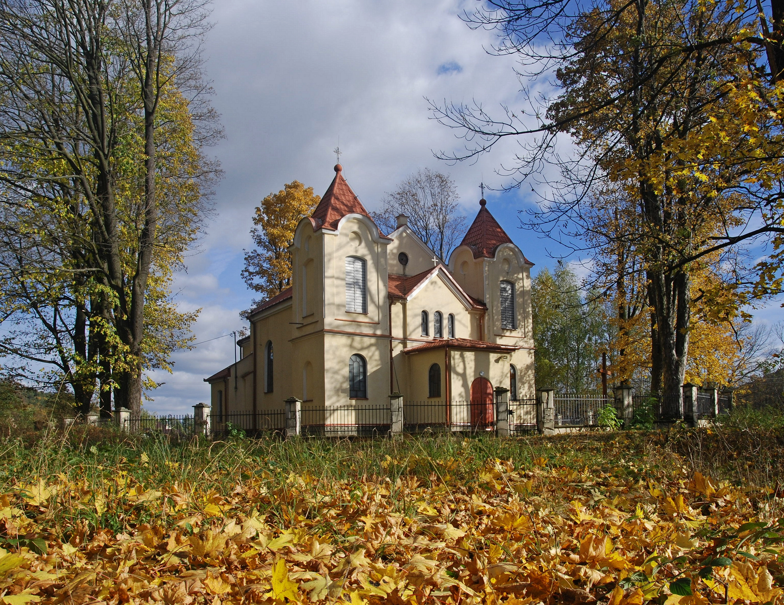 Bednarka, Cerkiew Opieki Najświętszej Maryi Panny w Bednarce Wikidata has entry Q28674499 with data related to this item.